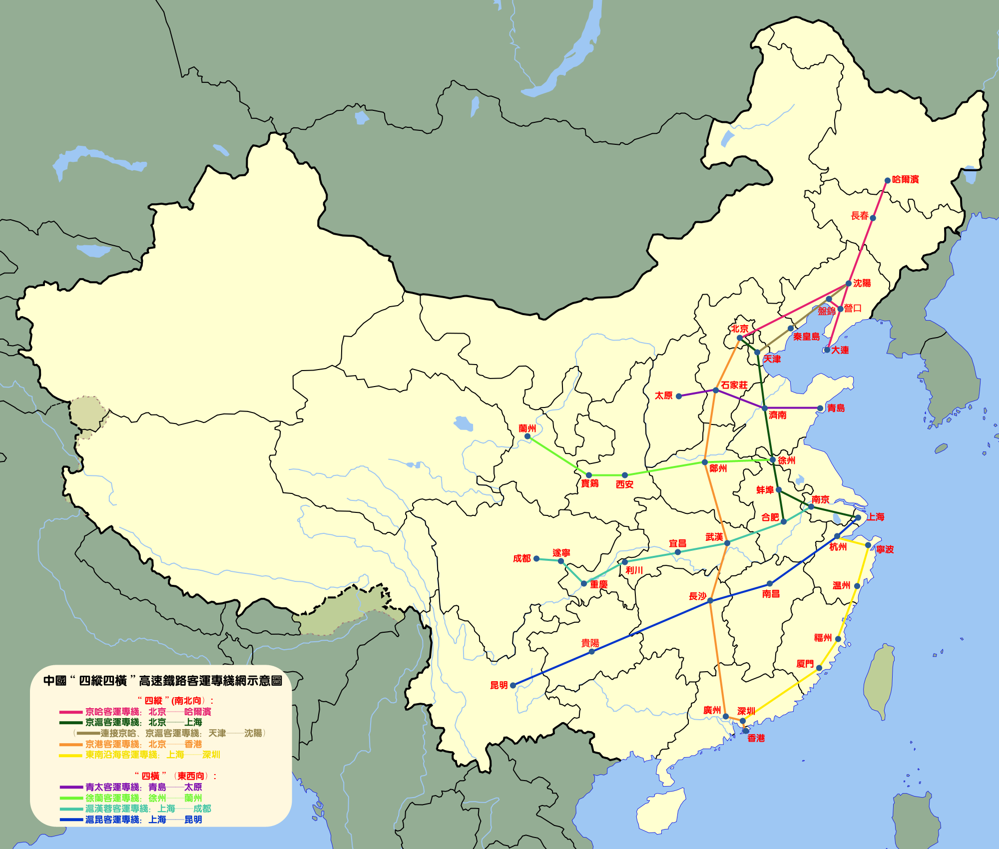 中國“四縱四橫”高速鐵路客運專線示意圖